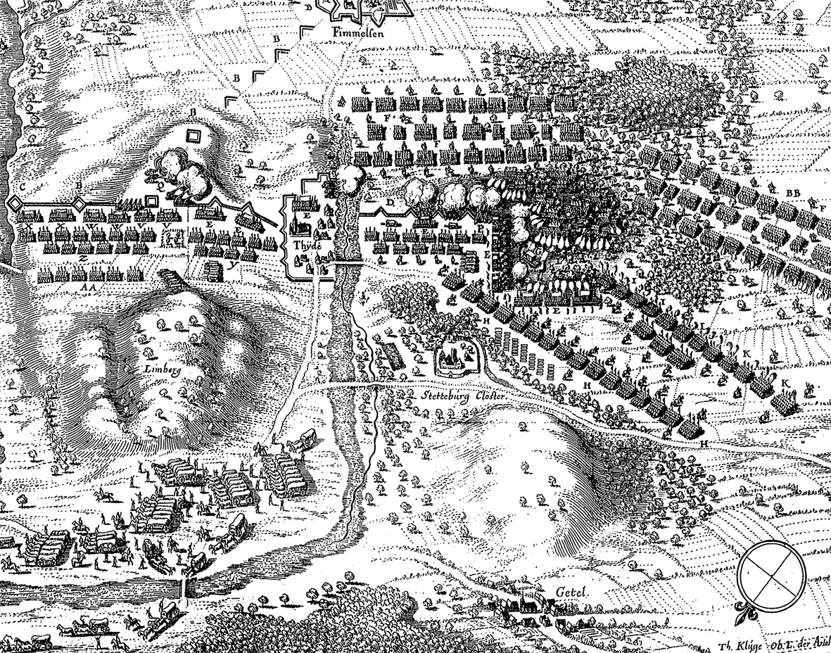 Belagerung von Wolfenbüttel im Jahr 1641 (Auschnitt eines Kupferstiches)